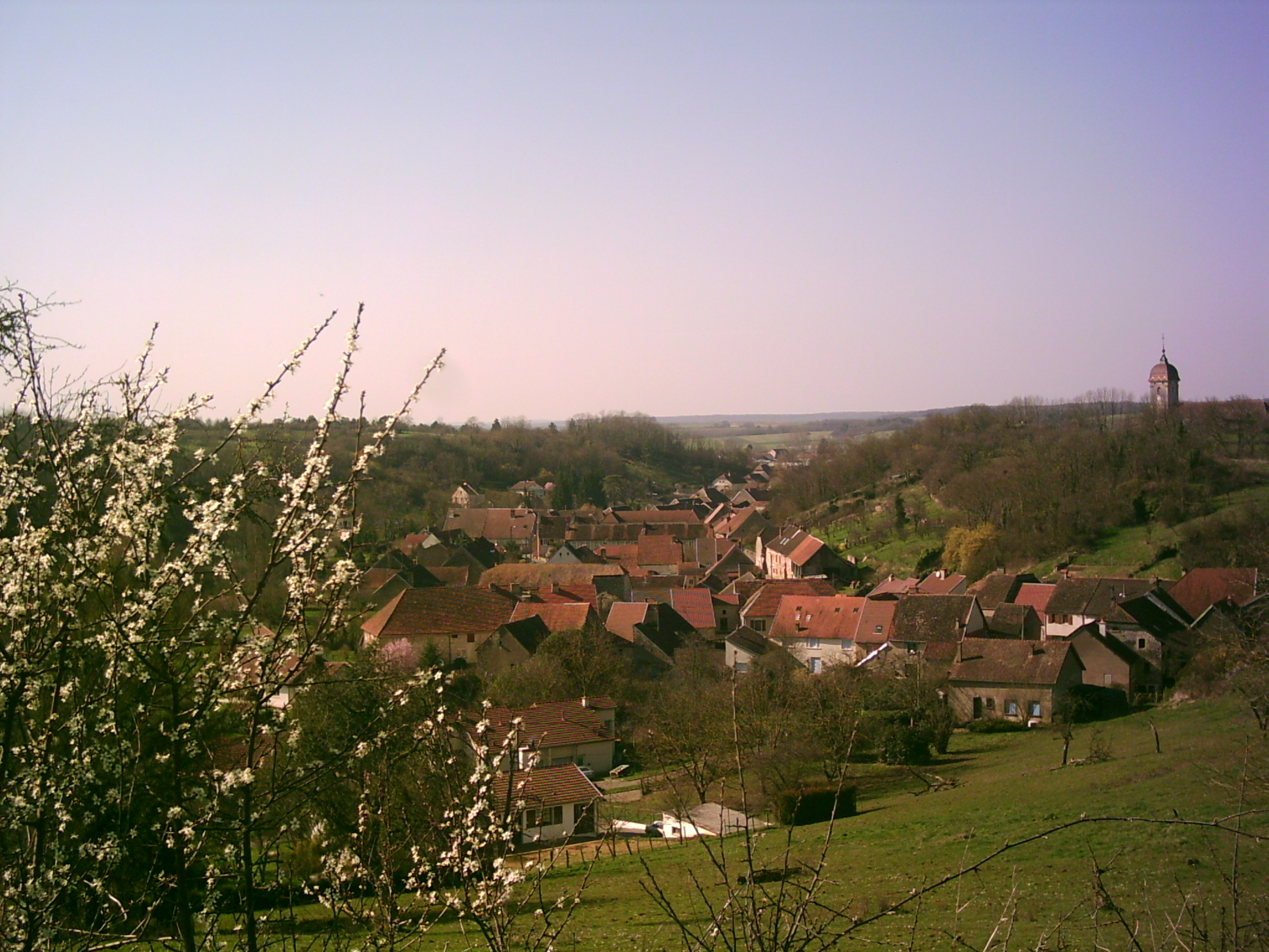 photo de Bucey-lès-Gy prise lors d'une randonnée de VTT